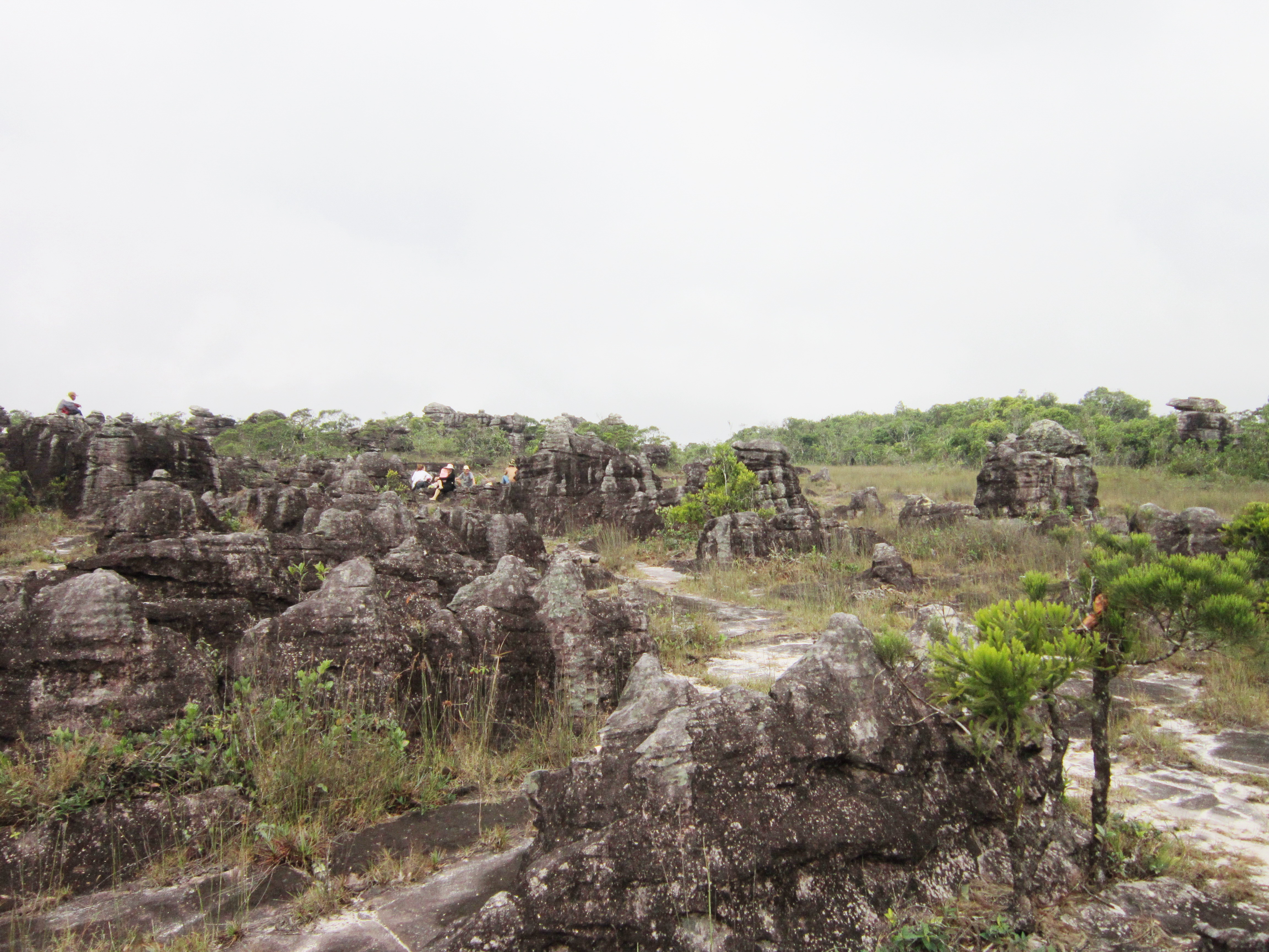 Phong cảnh trên núi đỉnh núi Bokor (Tà Lơn) thuộc tỉnh Kampot, Campuchia. Nơi này người Việt gọi là Lan Thiên.